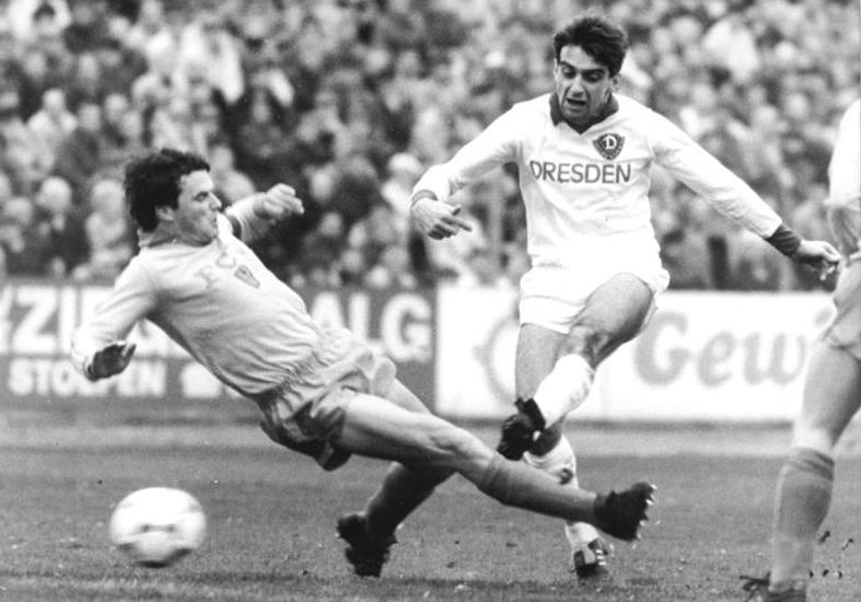 ADN-ZB-Häßler-7.11.87-zin- Dresden: Fußball-Oberliga Dynamo Dresden-FC Vorwärts Frankfurt/Oder 4:0 (3:0) Der Dresdener Ralf Minge (r.), zweifacher Torschütze für seine Elf, schießt in der 14. Spielminute zum 2:0 die den Gastgeber ein. Die Attacke von FCV-Kapitän Lothar Hause (l.) kommt zu spät[. Vor 16 000 Zuschauern waren die Elbestädter den Frankfurtern in allen Belangen überlegen und gewannen auch in dieser Höhe verdient.